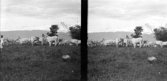 Stereonegatief. Vee van de fokkerij Padang Mengatas